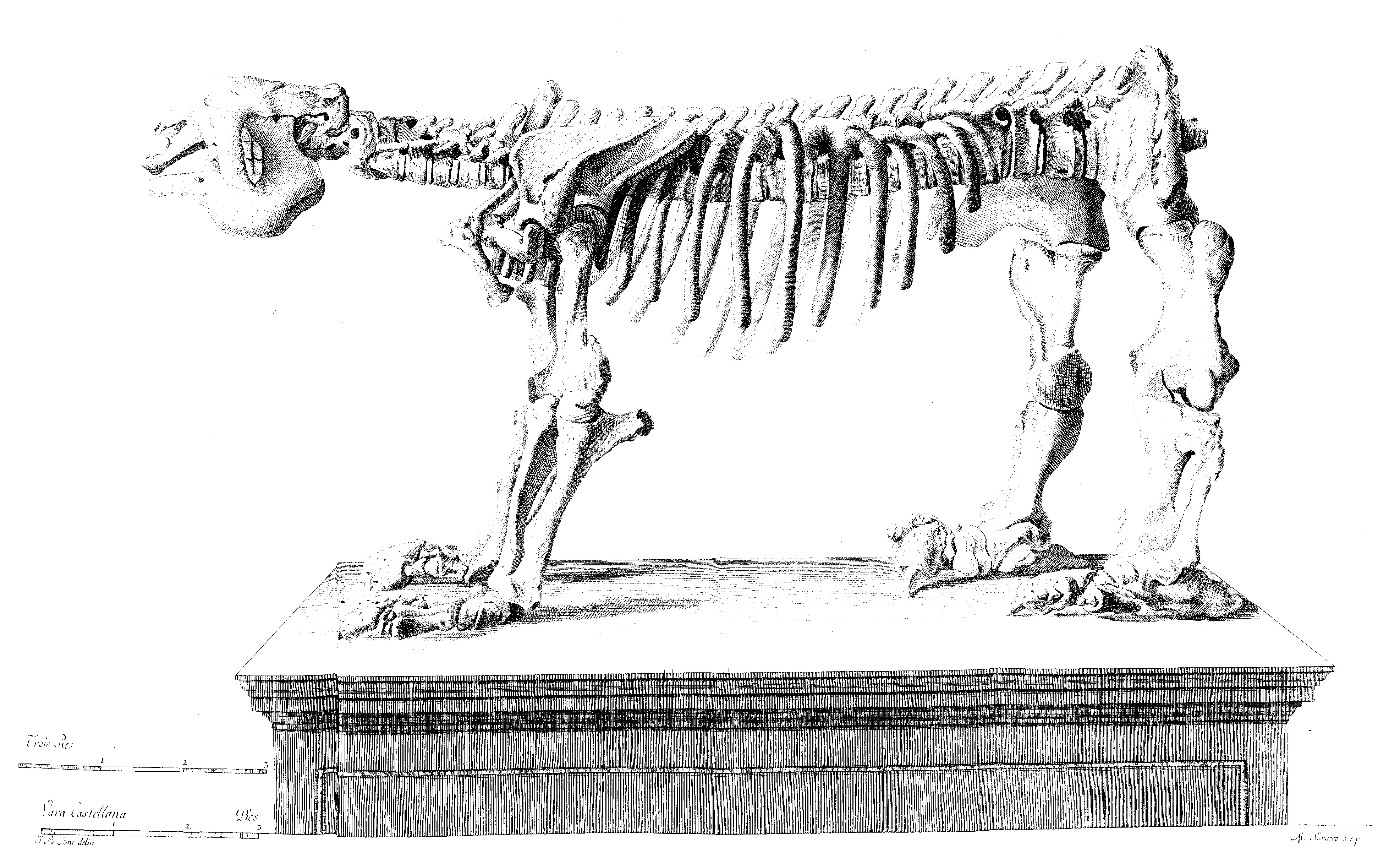 Esqueleto de megaterio dibujado por Juan Bautista Bru y grabado por Manuel Navarro, recogido en José Garriga, Descripción del esqueleto de un quadrúpedo muy corpulento y raro que se conserva en el Real Gabinete de Historia natural de Madrid, Madrid, Viuda de Joaquín Ibarra, 1796. Biblioteca Nacional de España.